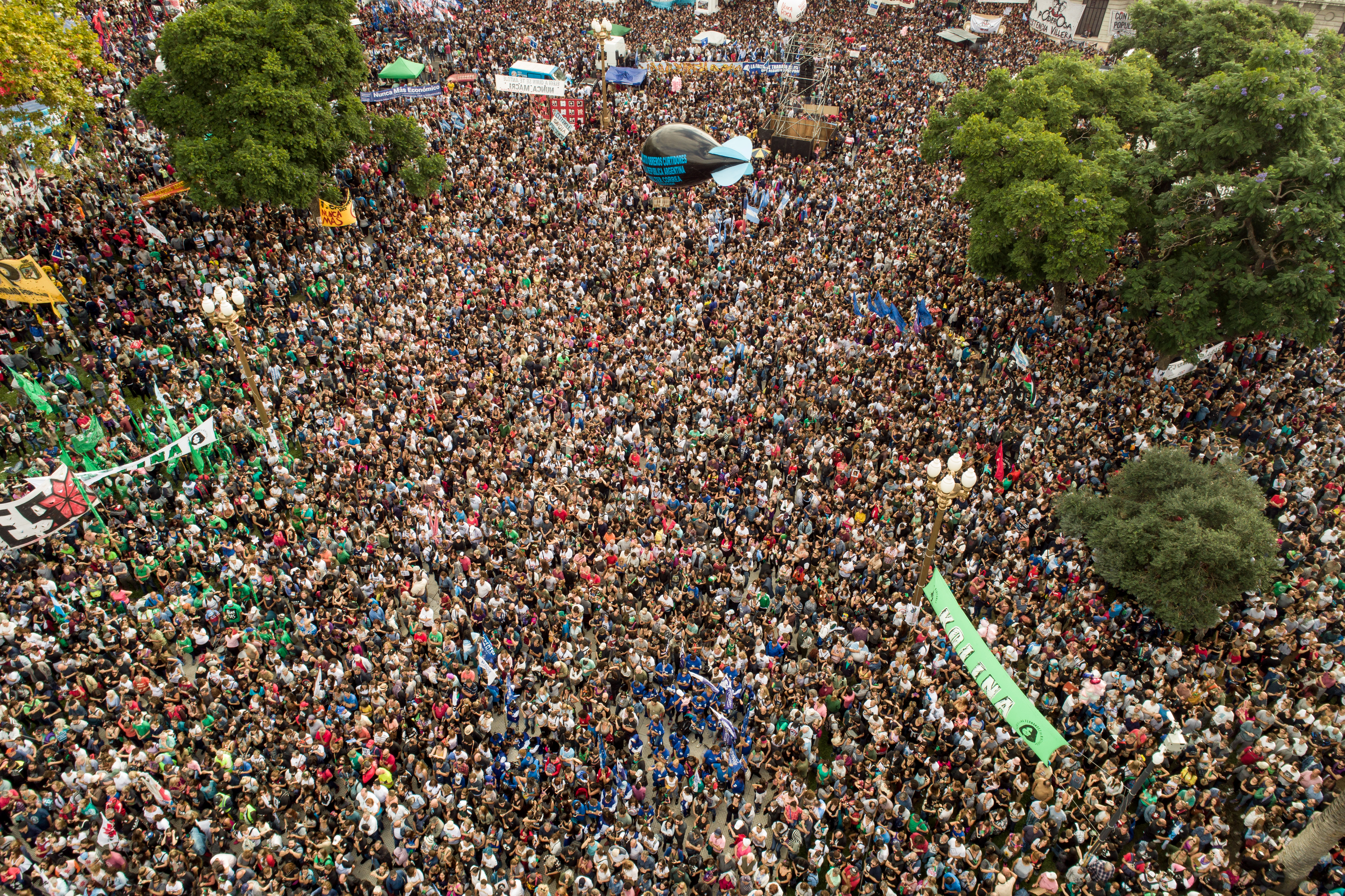 Marcha por el Día por la Memoria, la Verdad y la Justicia en la Ciudad Autónoma de Buenos Aires